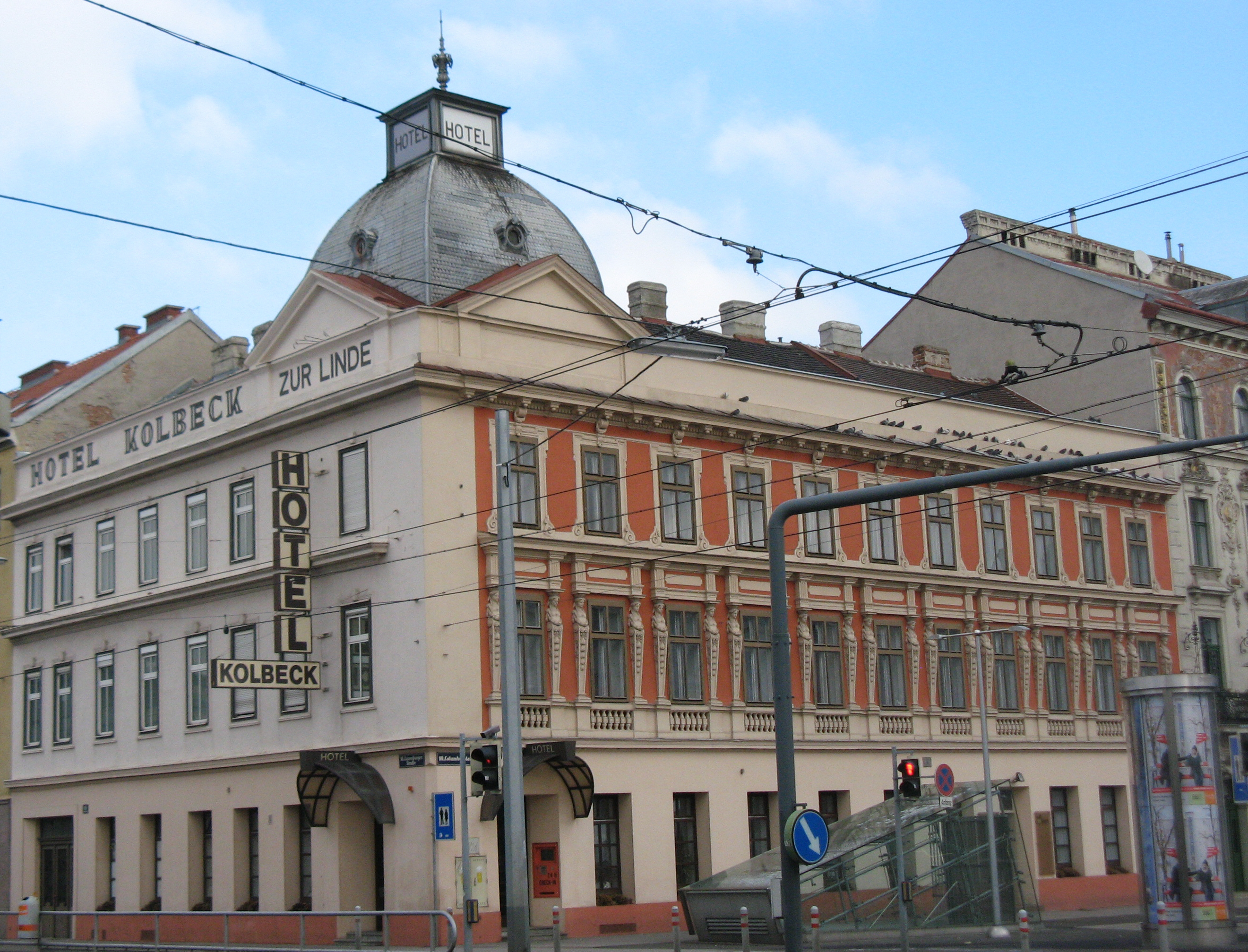 Hotel Kolbeck (1867), Laxenburger Straße 19, Wien-Favoriten